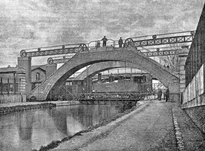 Pont levant, inauguré en 1868, met en communication les voies de la gare du marché aux bestiaux de la Villette avec celles des abattoirs, situées de part et d'autres du canal de l'Ourcq. La locomotive porte le numéro 9 du chemin de fer de ceinture.